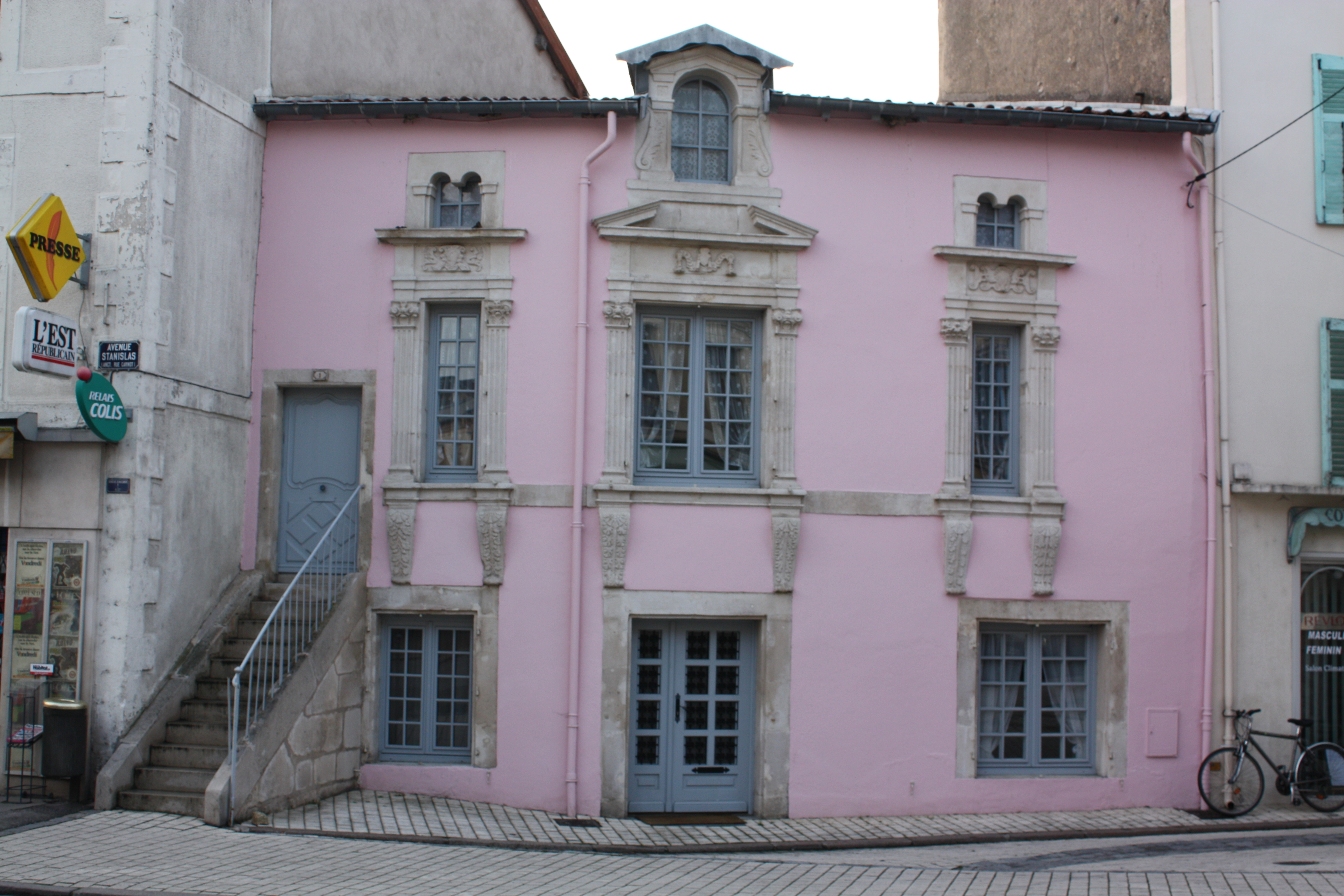 Maison Renaissance, 1 rue des juifs à Commercy